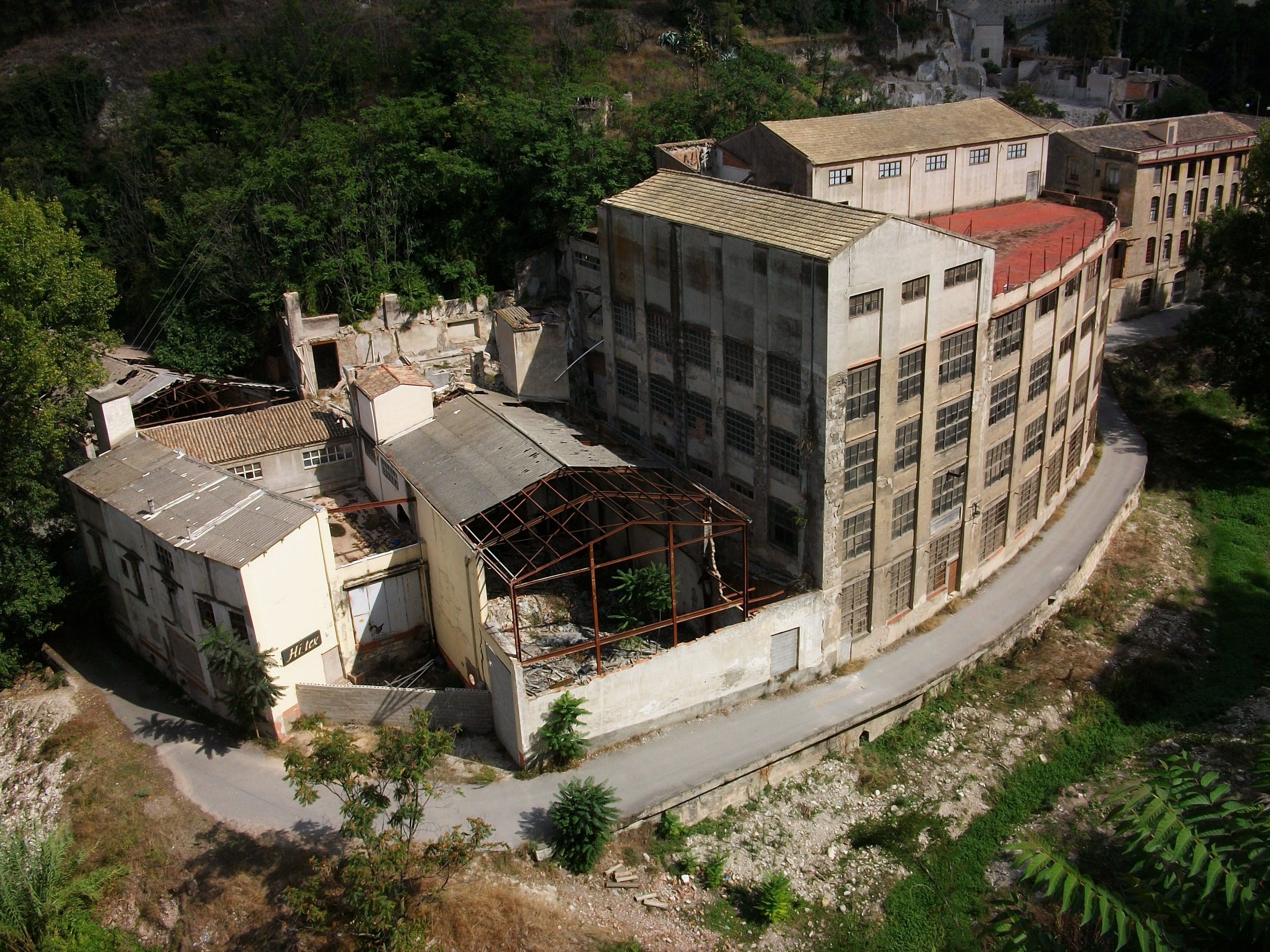 Fàbrica abandonada al Tossal (Alcoi).